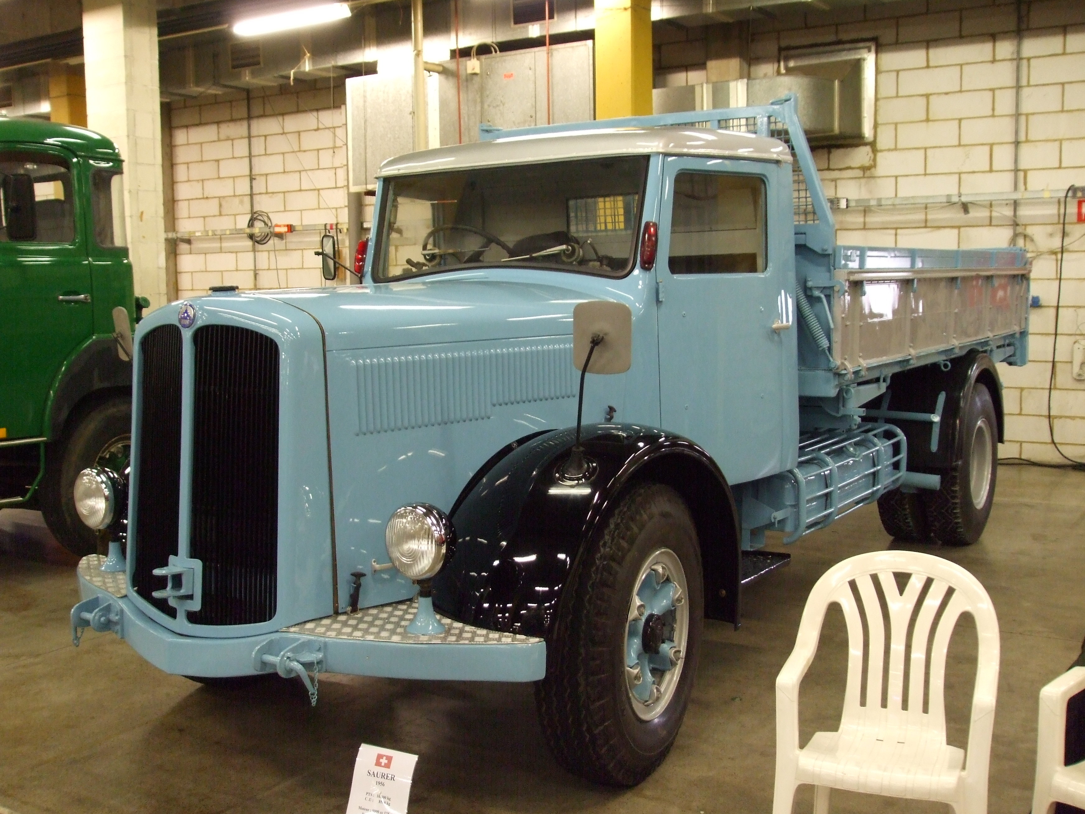 Saurer Kipper mit Hauberfahrerhaus bei der Retro in La Louvière